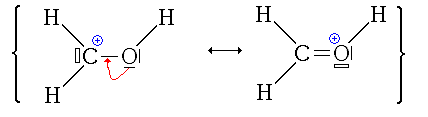 Mésomérie n-sigma-v